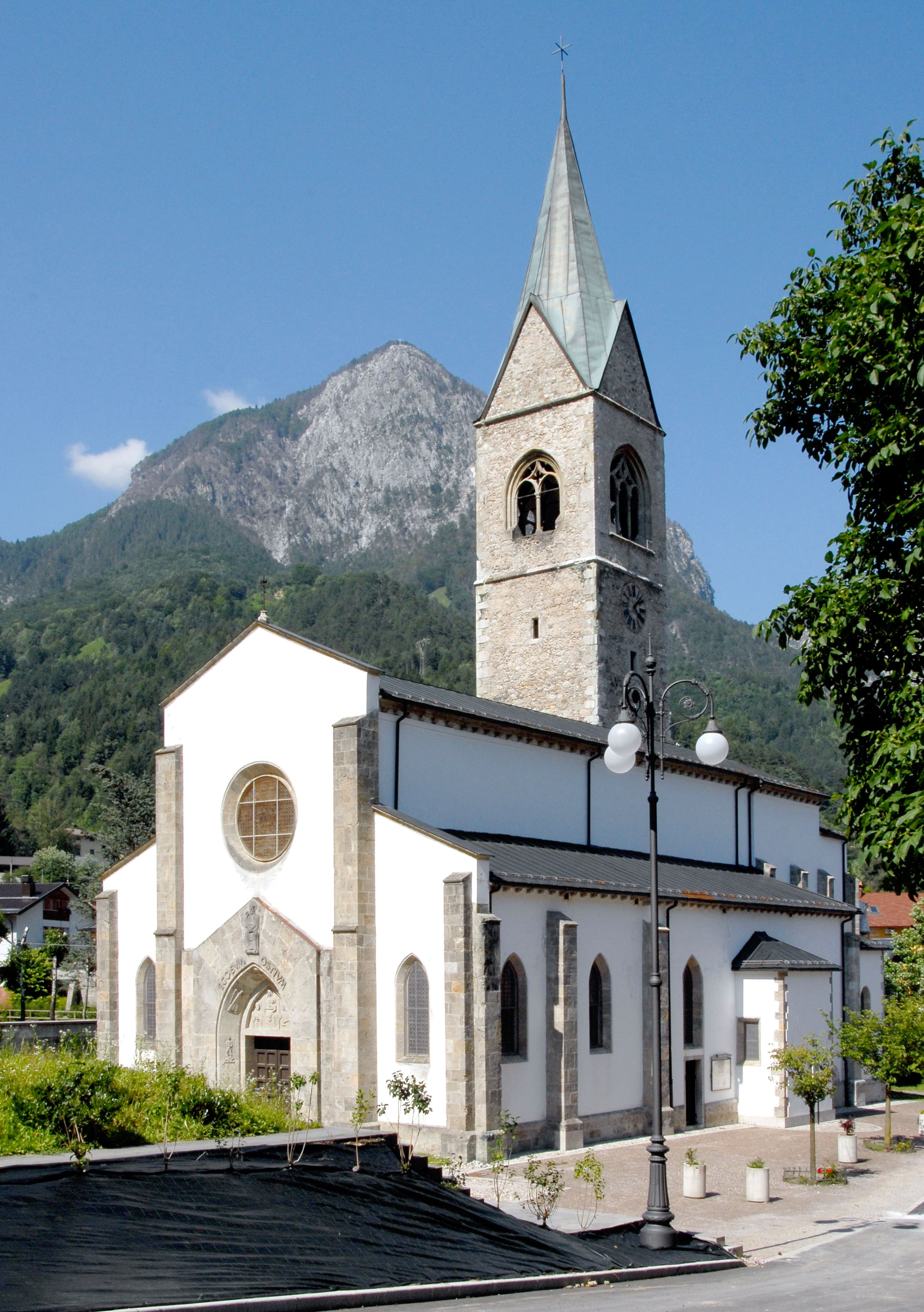 Church “Pieve di Santa Maria Maggiore” in Pontebba in Val Canale, Friuli-Giulia Venezia, Italy